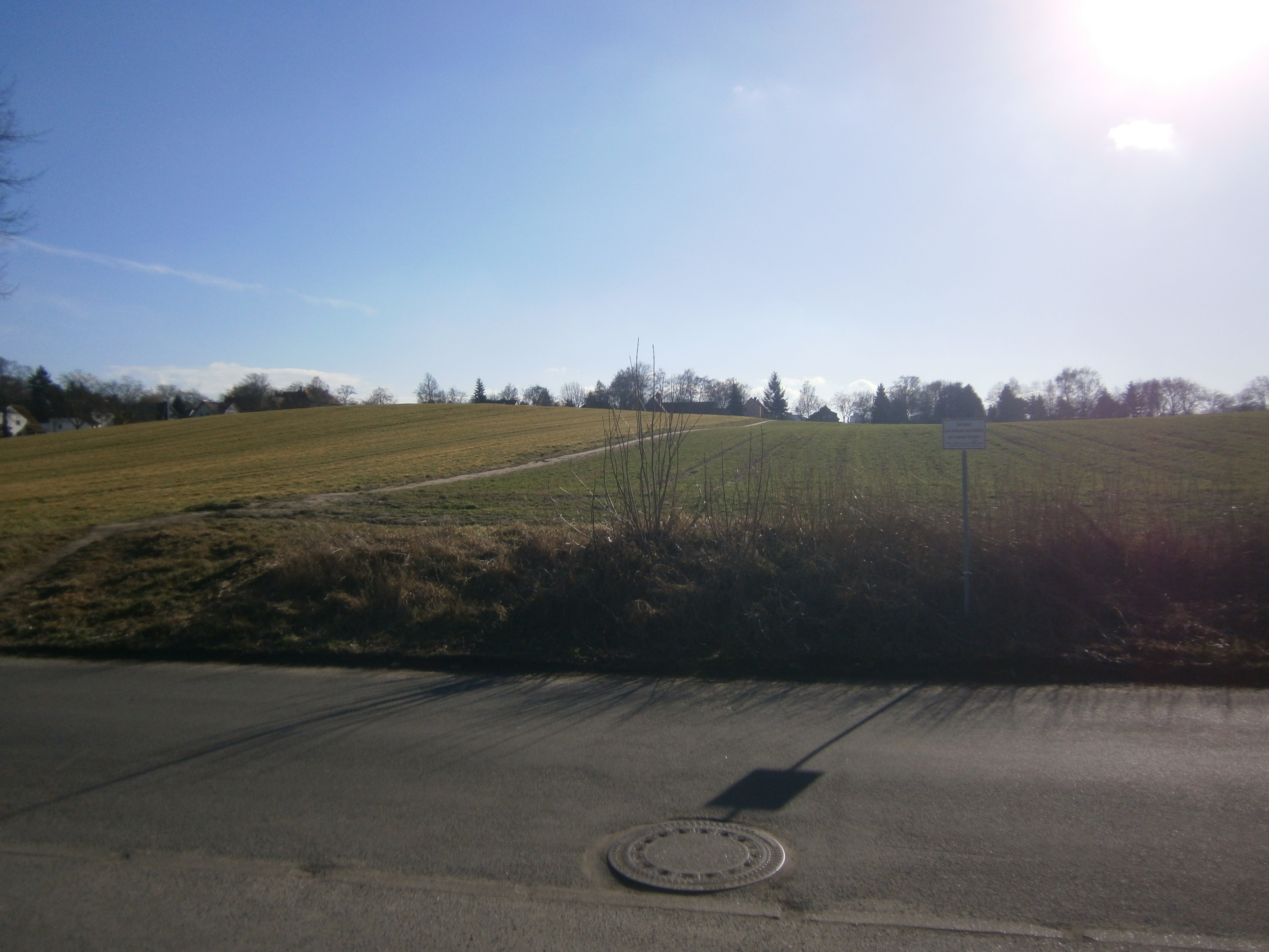 Die Benekendorffstraße ist eine Straße in Berlin-Lübars. Hier der Blick von der Straßenkreuzung am Mergelweg nach Süden über die Ackerfläche am Vierrutenberg in Richtung evangelische Kirche Lübars